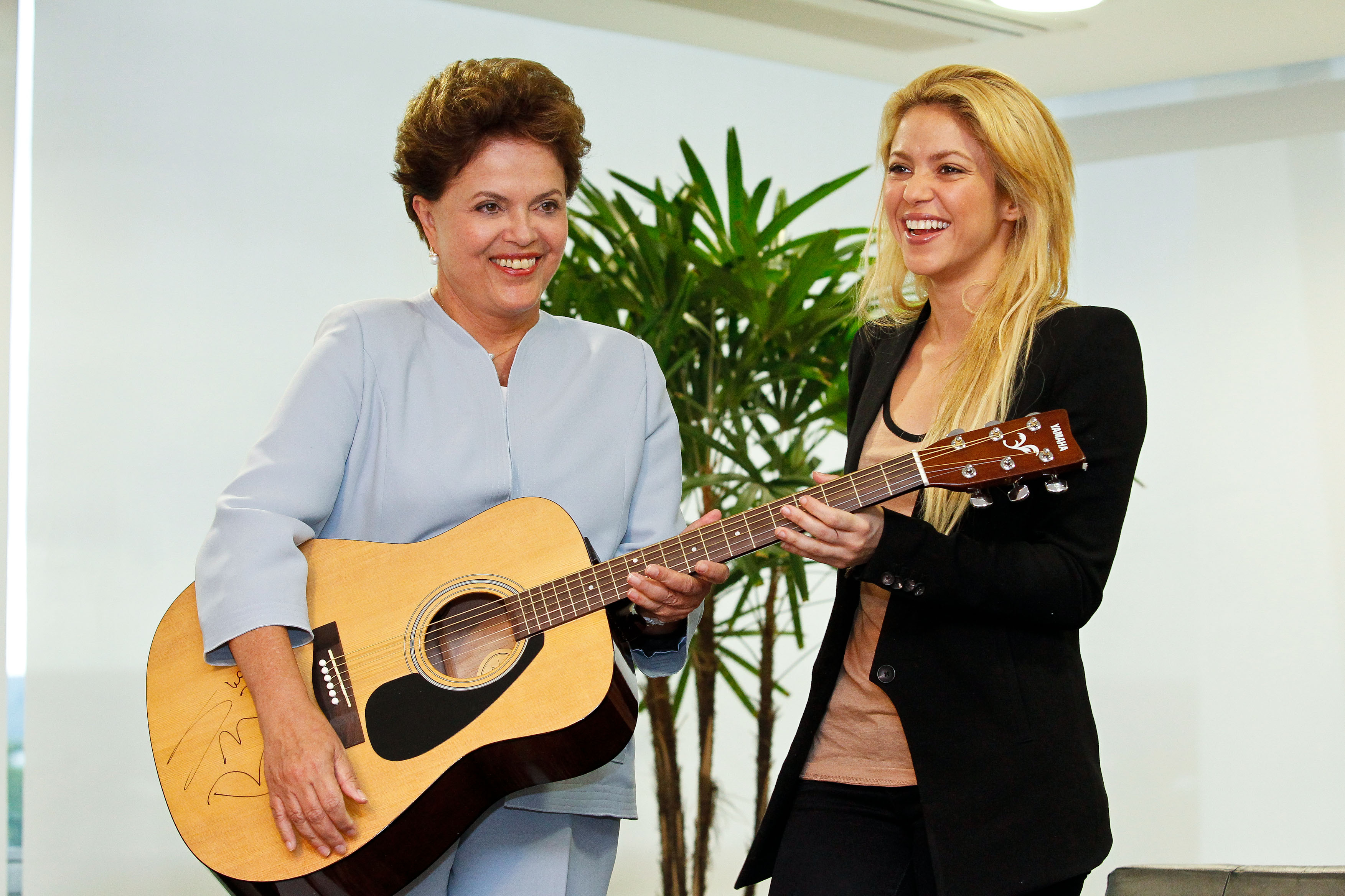 Presidenta Dilma Rousseff recebe a cantora Shakira Mebarak. Brasília, Distrito Federal.